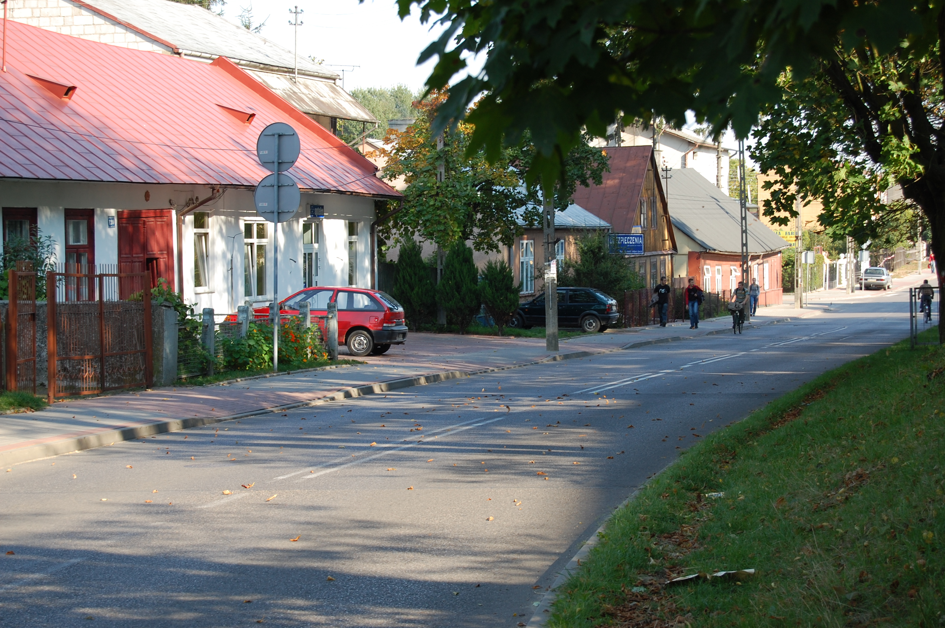 Widok ulicy Długiej w Żelechowie